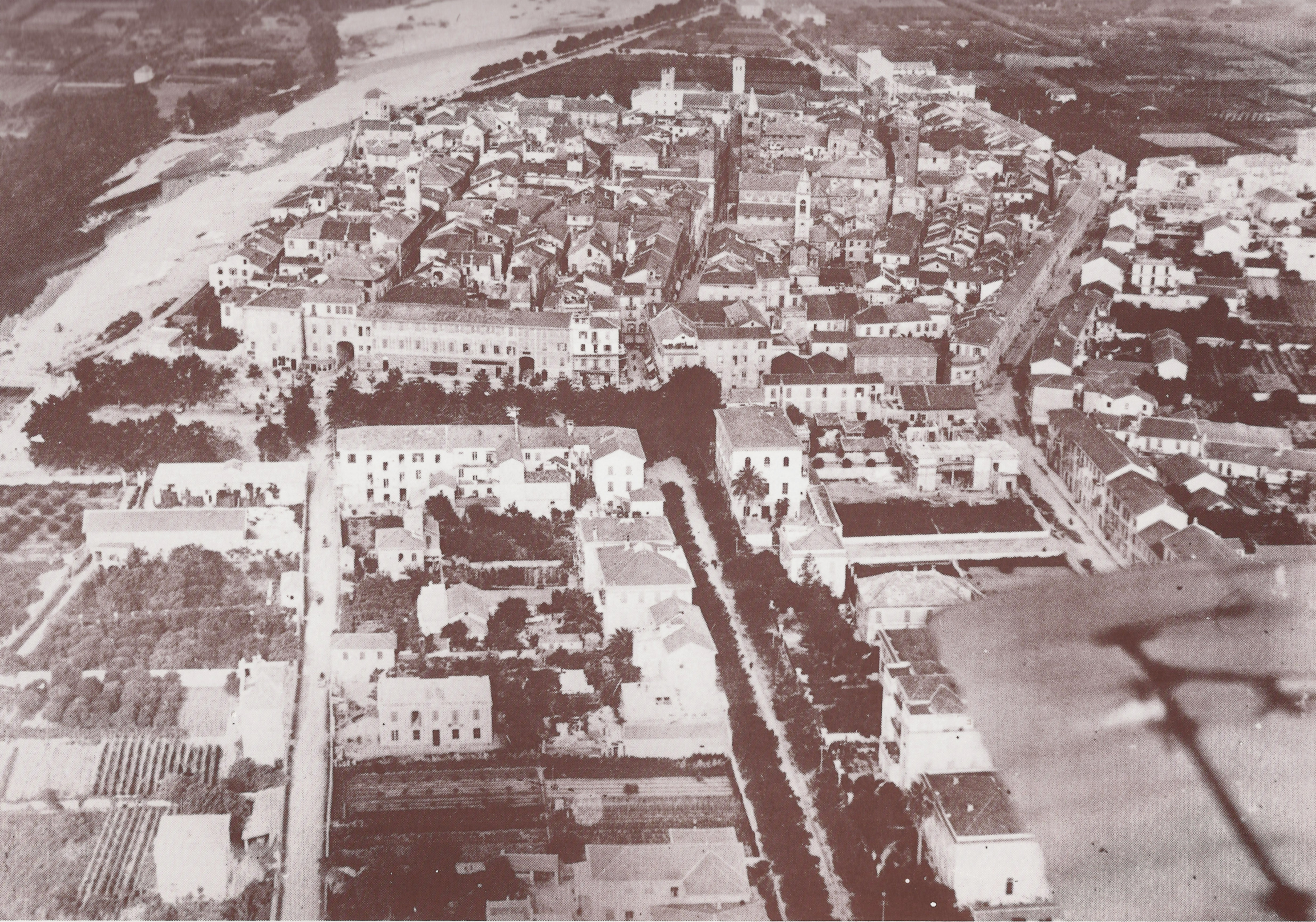 Una delle prime immagini aere di Albenga. Probabilmente intorno agli anni '20.